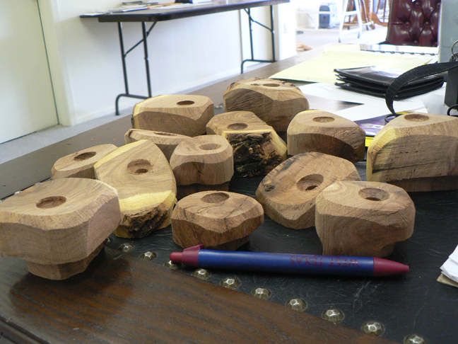 Série de prises d'escalade en bois coupé dans des morceaux bruts.